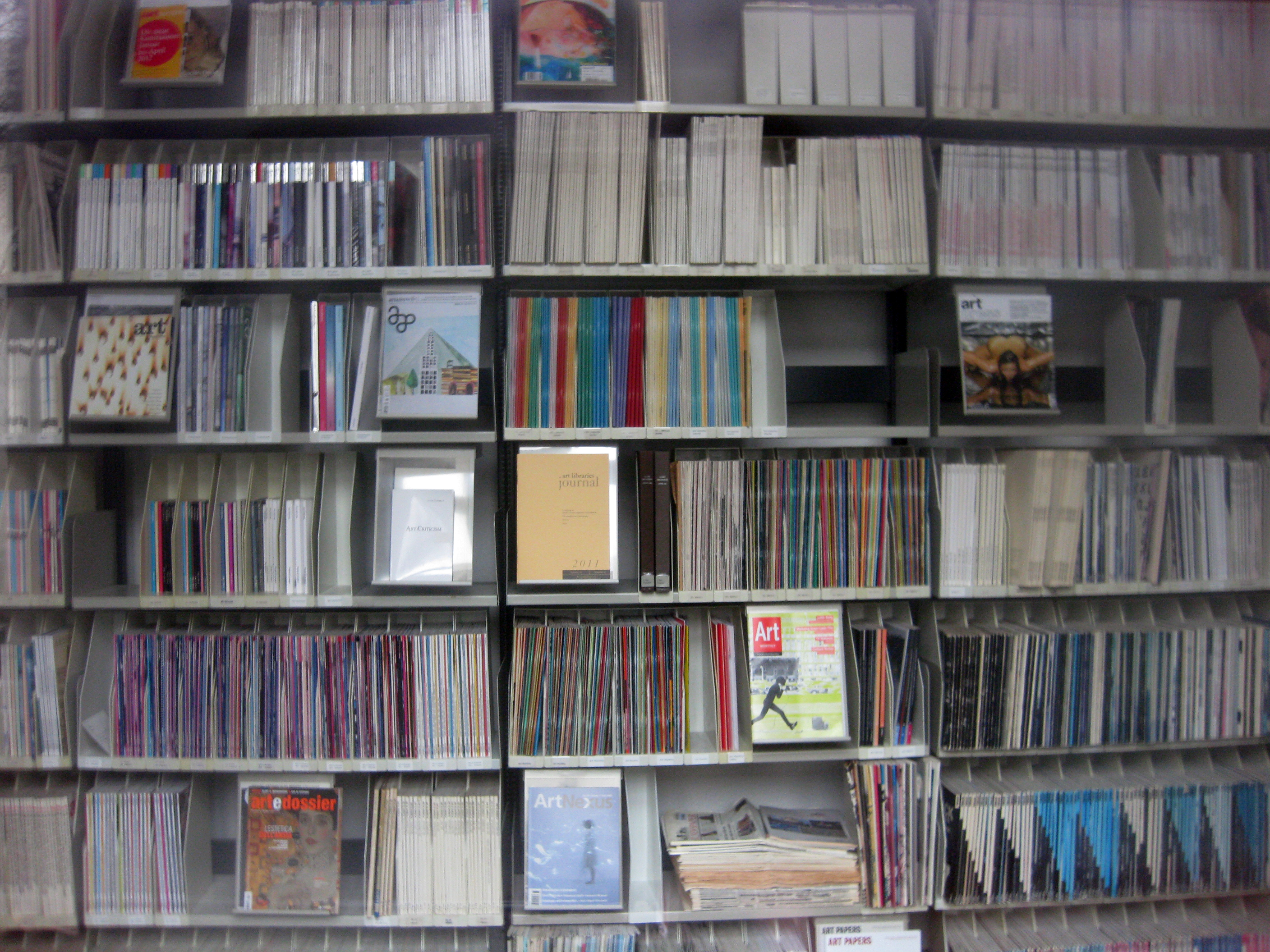 Regal in der Bibliothek des documenta Archivs